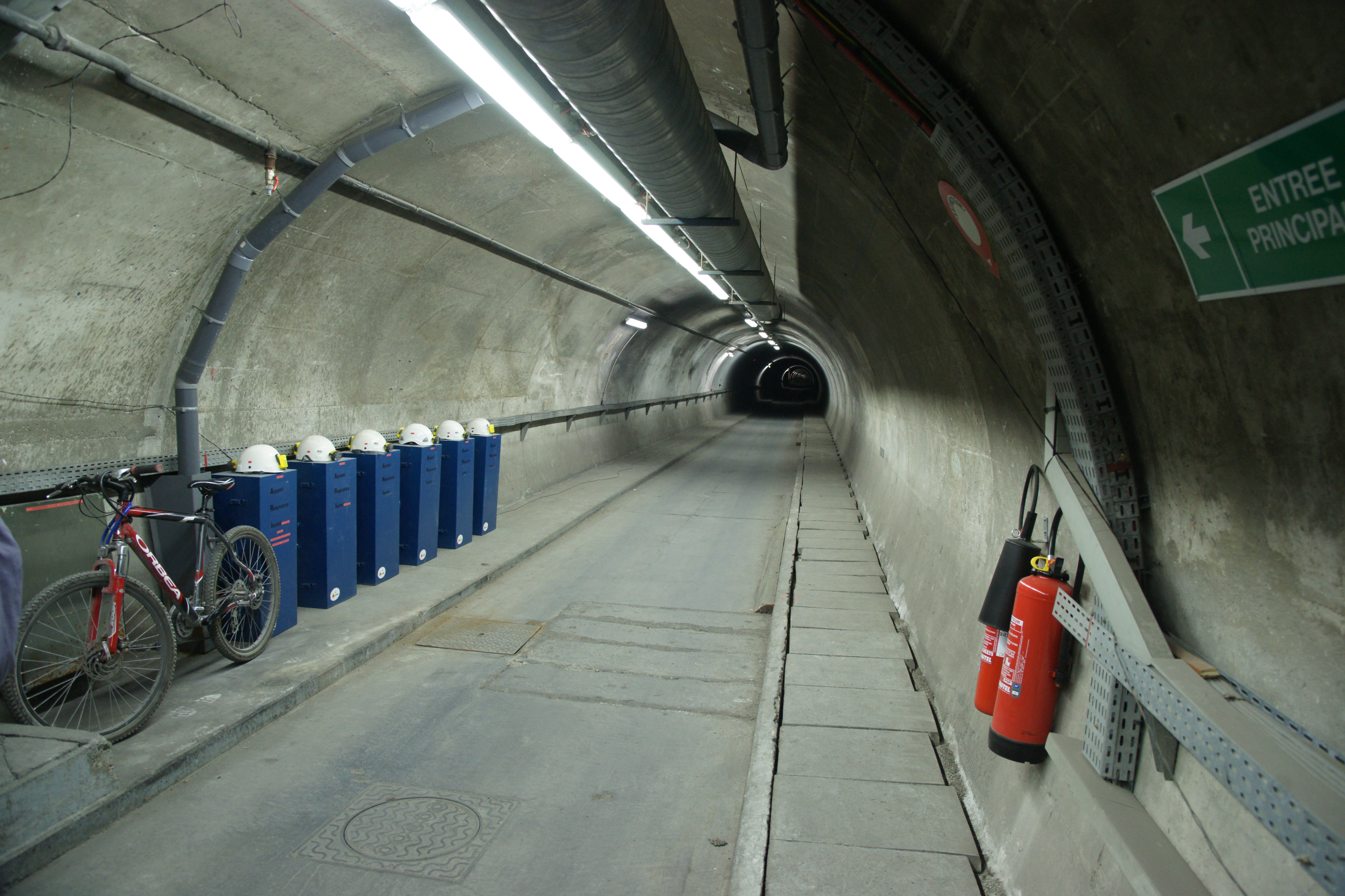 Tunnel du LSBB, Rustrel, France